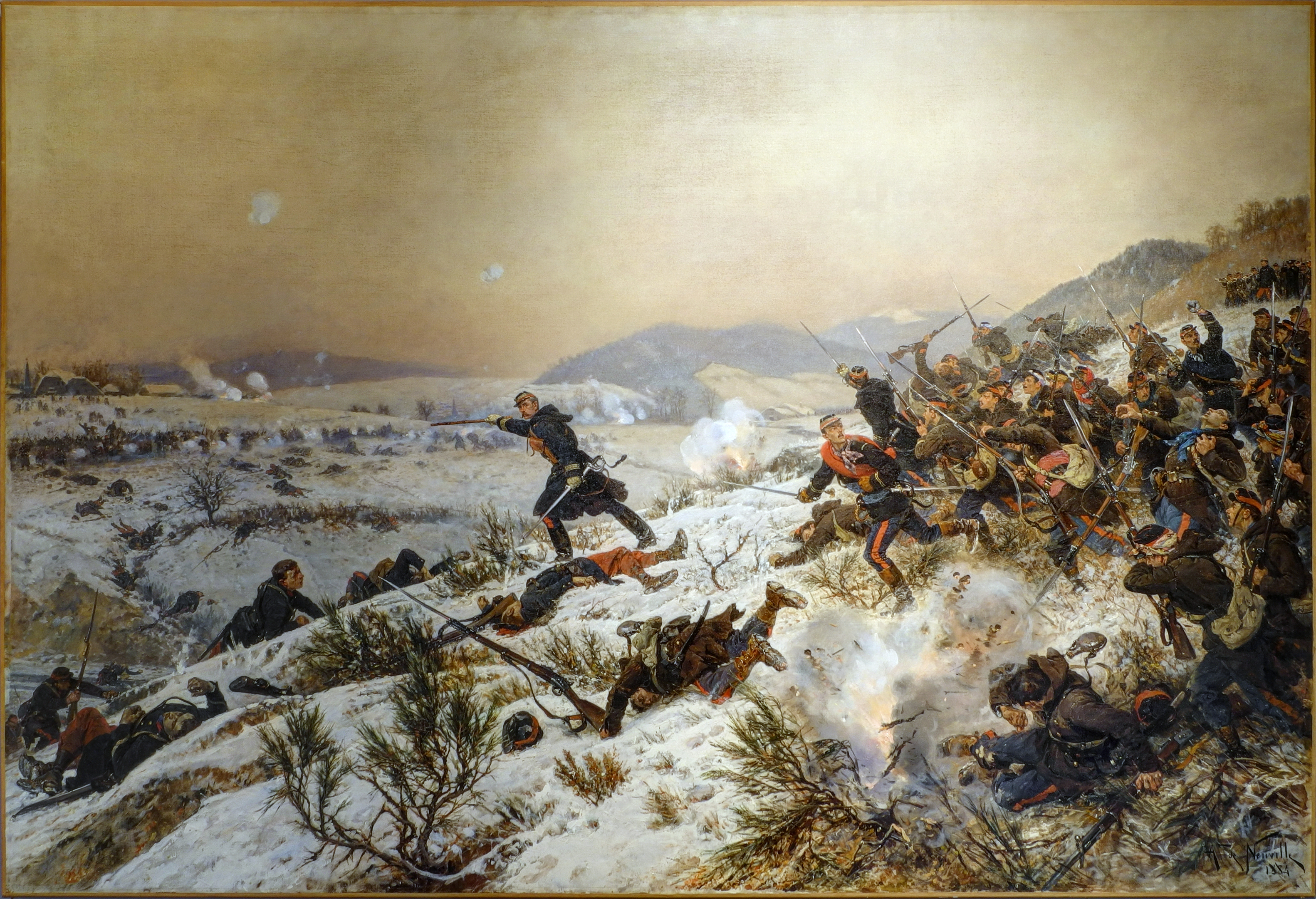 Musée d'Histoire : En avant ! ou Le combat de Chenebier (HDR). Alphonse Deneuville (Saint-Omer, 1835 - Paris, 1885). Cette huile sur toile compte parmi les dernières œuvres réalisées par Alphonse de Neuville. Ce peintre académique influencé par Eugène Delacroix (1798 - 1863) est, avec Édouard Detaille (1848 - 1912), un des principaux représentants de la peinture militaire de la fin du XIXe siècle, en se spécialisant dans les scènes relatant la guerre franco-prussienne de 1870. Dans cette œuvre, A. de Neuville, qui a bénéficié de son vivant d'une véritable reconnaissance publique à travers son plus célèbre tableau "Les dernières cartouches" (1873), toute la composition témoigne d'une volonté de servir la Nation, en peignant les héros tragiques de la défaite, celle de la bataille de la Lizaine de janvier 1871, qui aurait pu peut-être changer le cours de l'histoire en débloquant Belfort. 1884, huile sur toile Coll. Musées de Belfort, achat 1999 avec l'aide du FRAM, fonds d'acquisition pour les musées de Franche-Comté